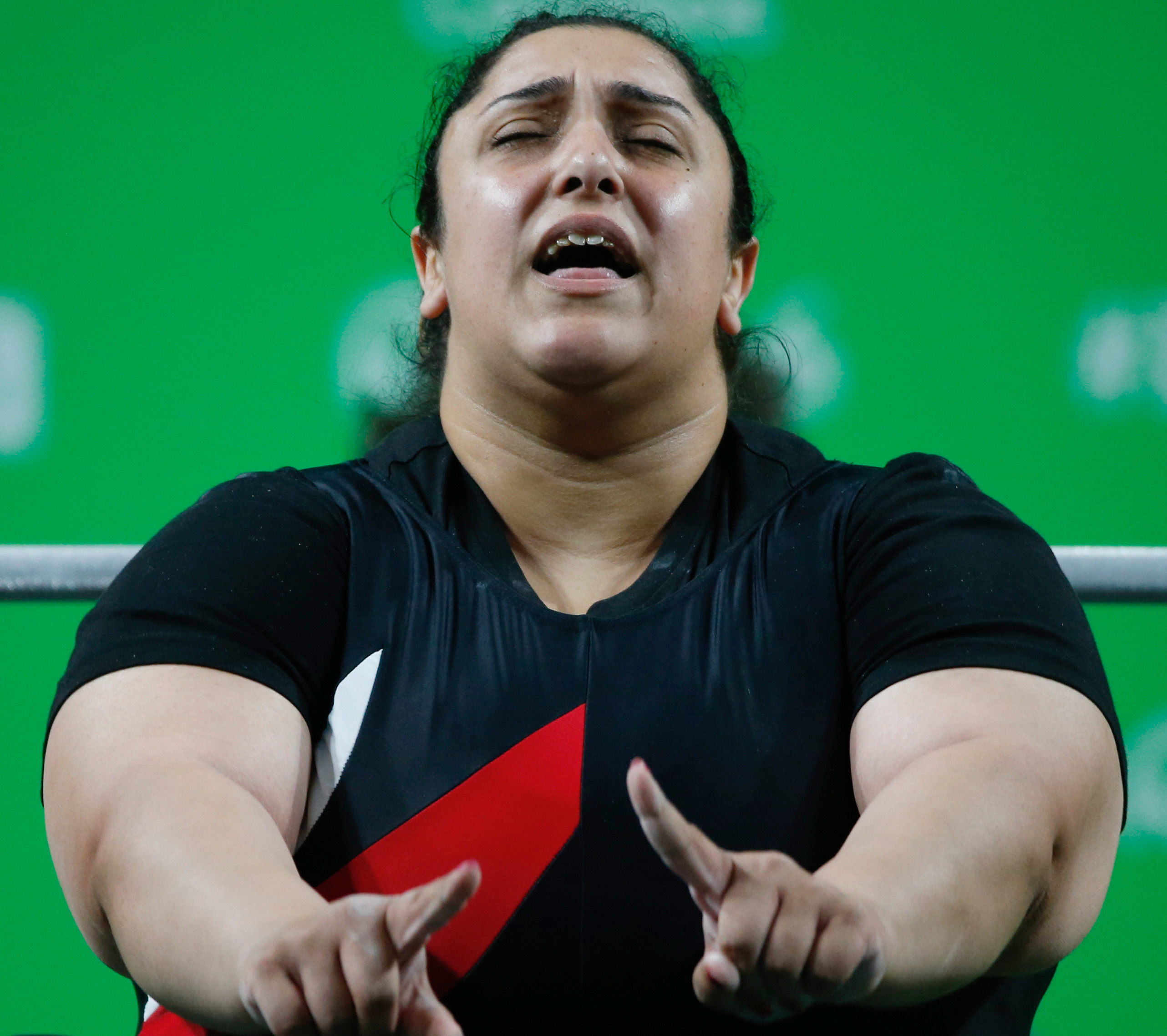 Rio de Janeiro - Egípcia Randa Mahmoud vence final feminina no levantamento de peso, categoria até 86 kg, nos Jogos Paralímpicos Rio 2016 (Fernando Frazão/Agência Brasil)